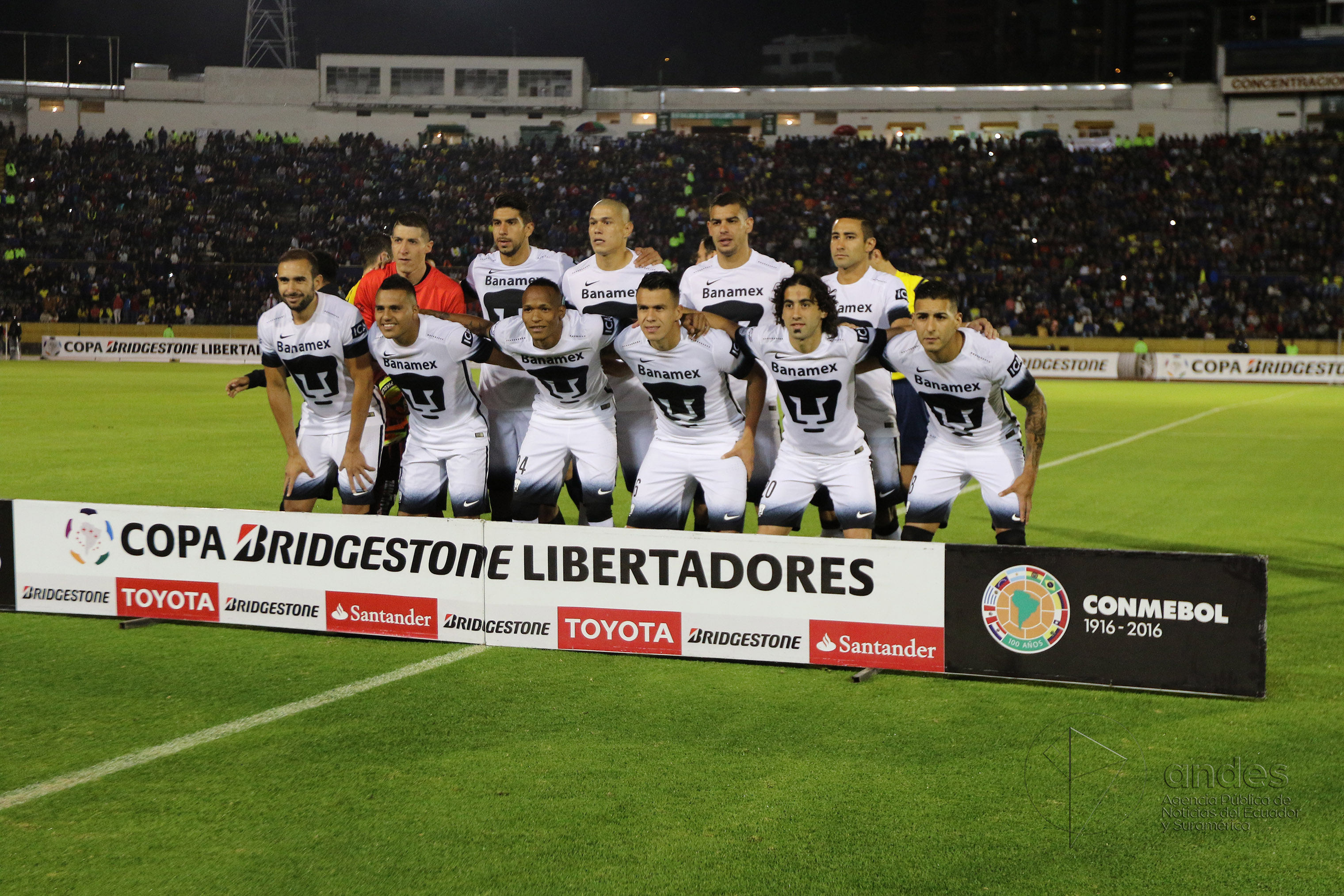 INDEPENDIENTE vs PUMAS